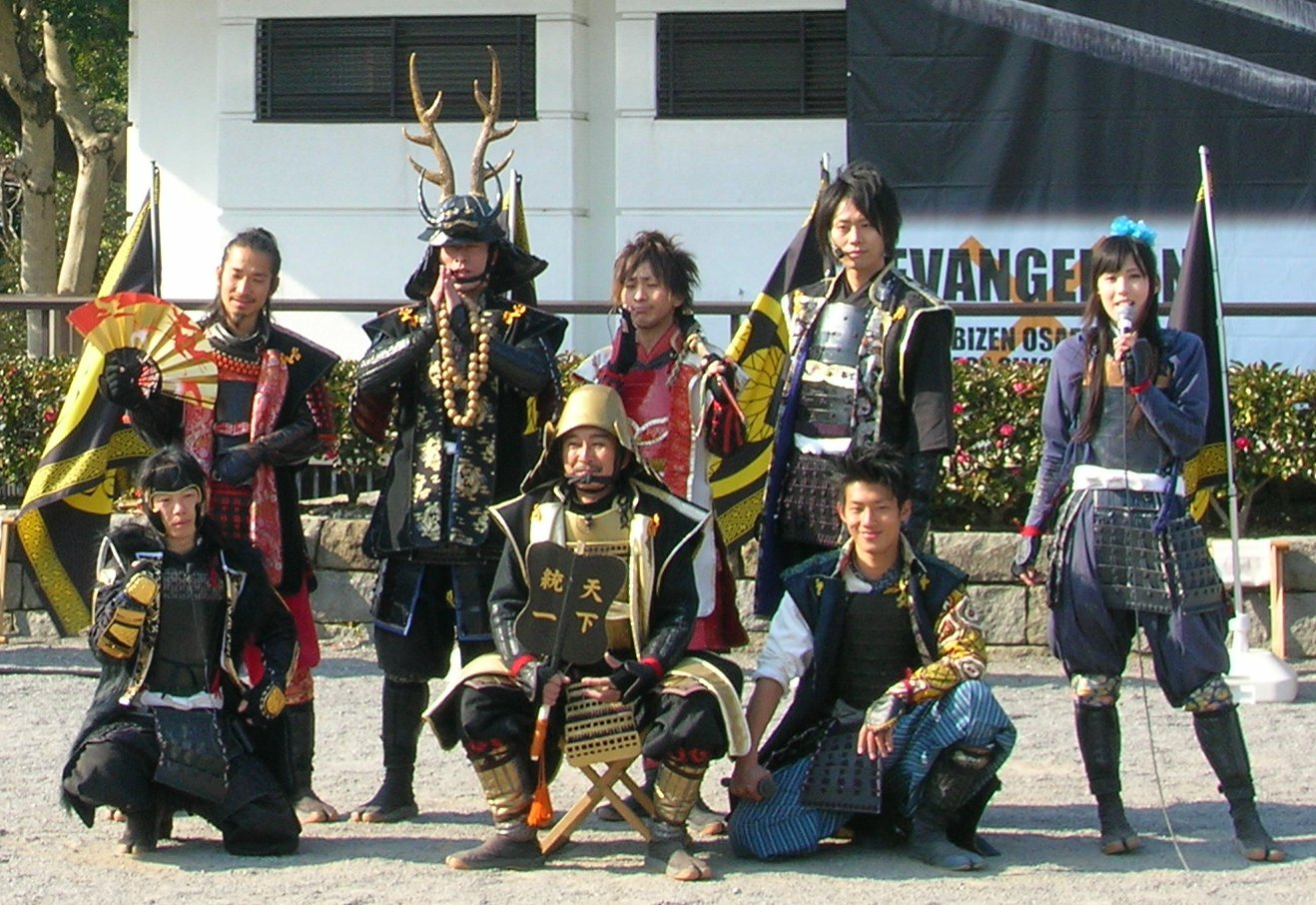 Aoi Bushō-tai Loc: Okazaki park. Okazaki city, Aichi Prefecture, Japan. グレート家康公「葵」武将隊 撮影場所 愛知県岡崎市・岡崎公園